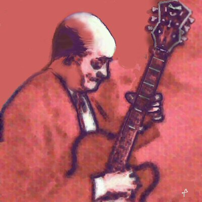 Joe Pass, drawing by Julien Grandgagnage